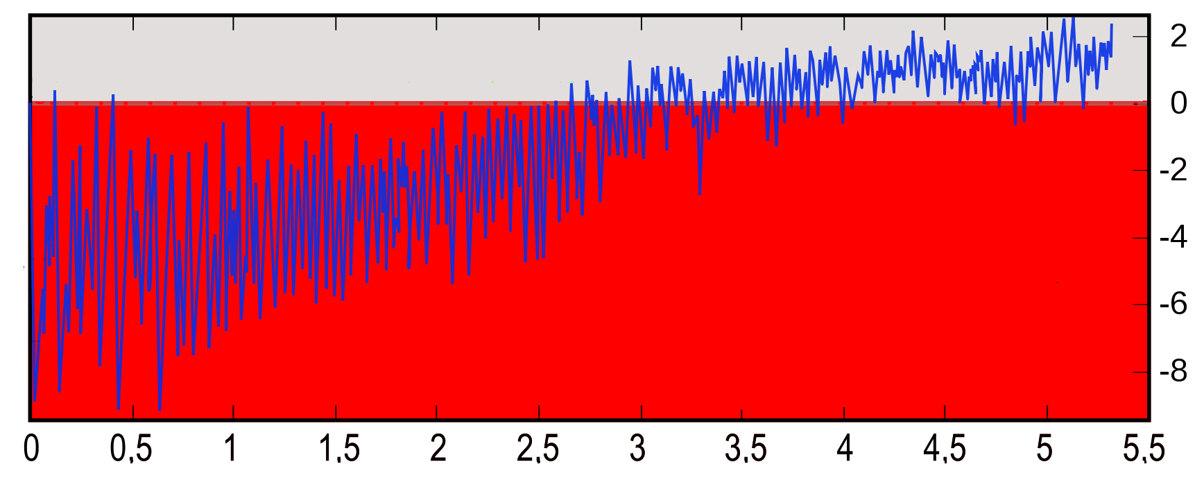 Hőmérséklet-diagram az utóbbi ötmillió évről